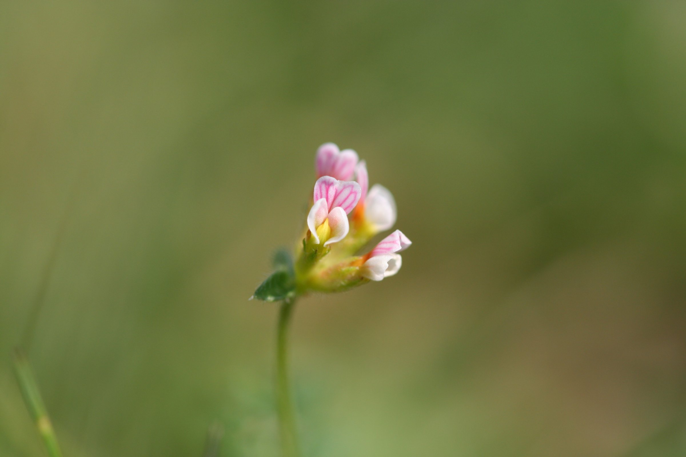 Kleiner Vogelfuß (Ornithopus perpusillus), Detailaufnahme